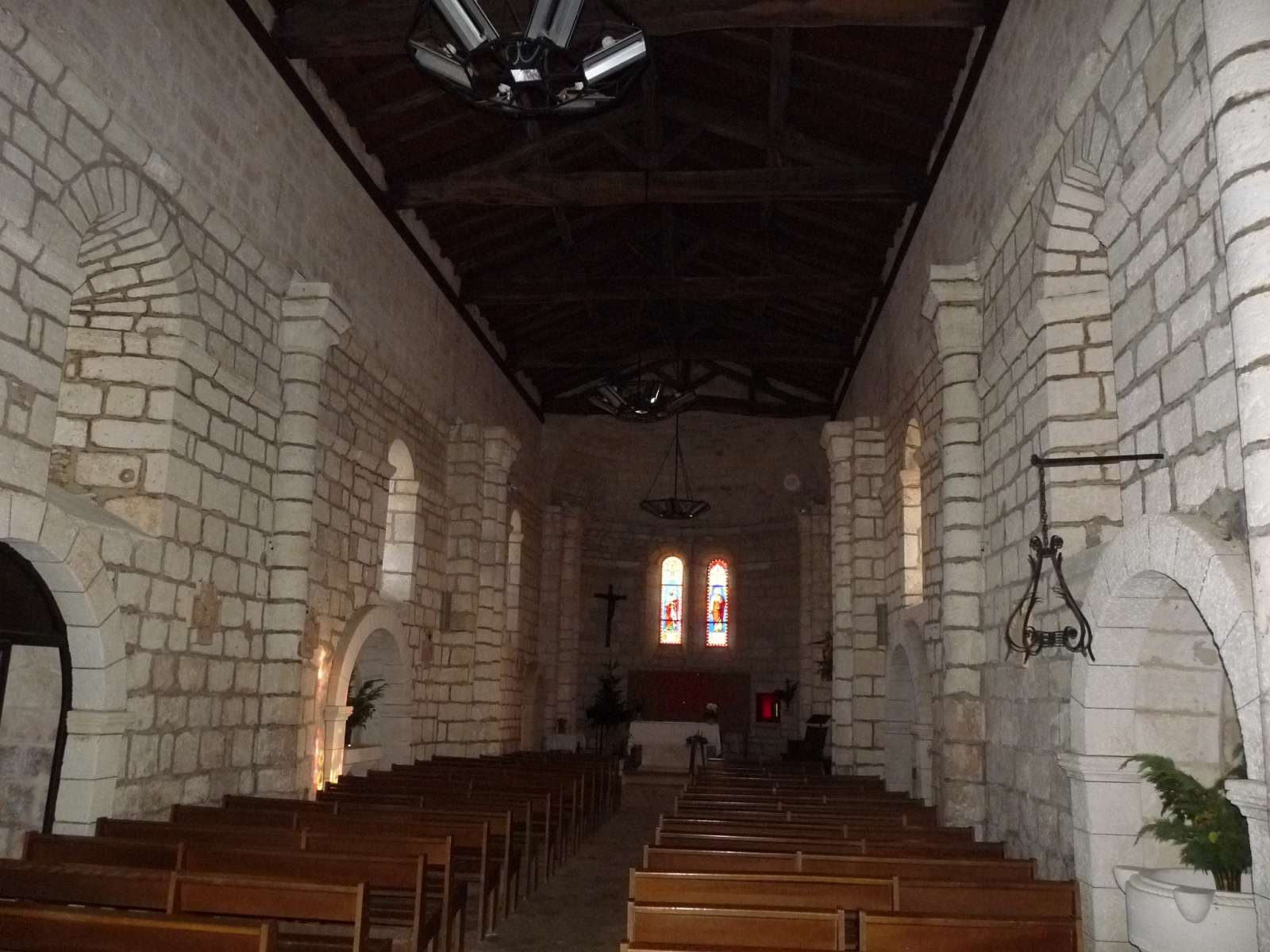 église de Garat, Charente, France